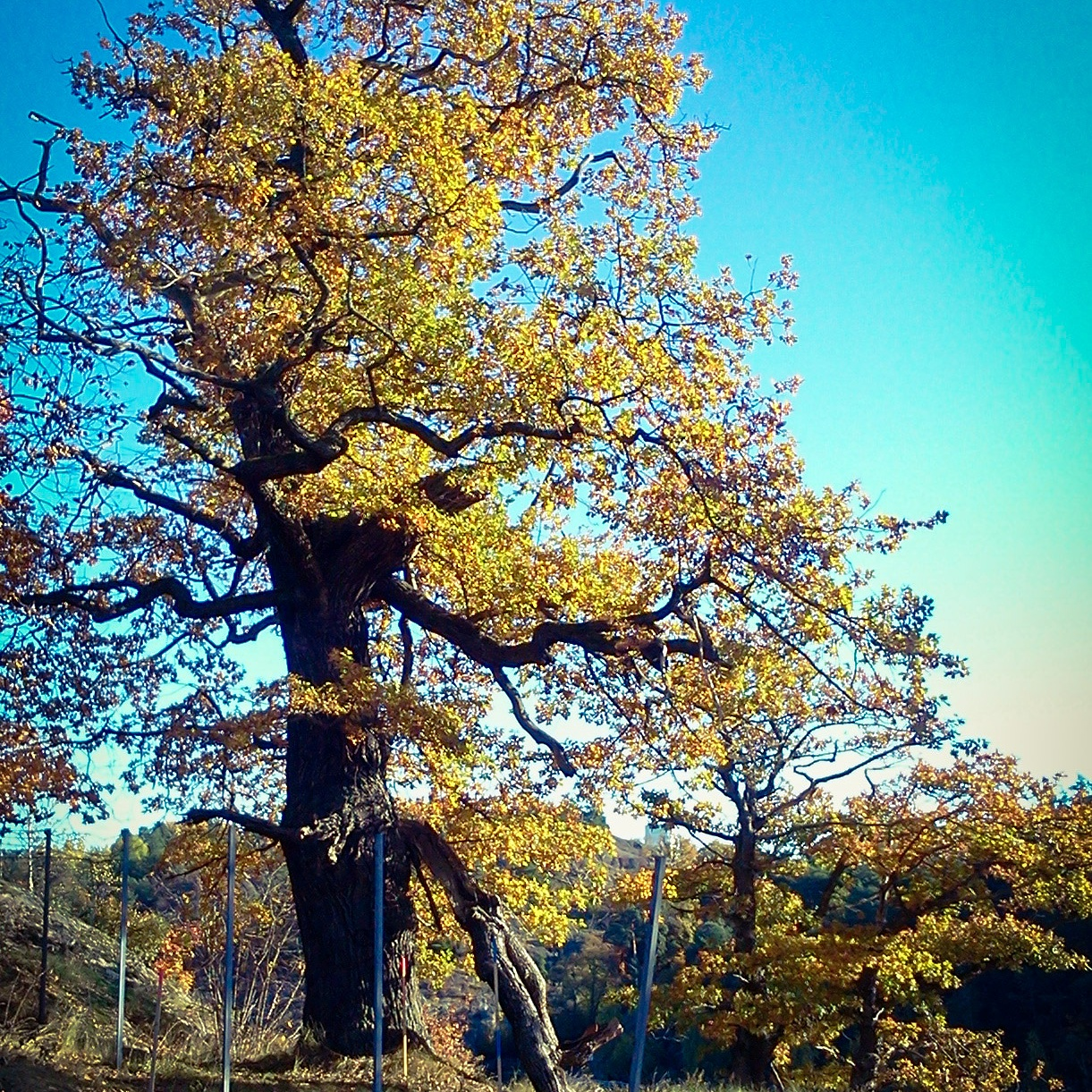 Stora eken i Fredriksberg på Kvarnholmen i Nacka användes tidigare under bröllopsceremonier. Den skövlades 2014 för Kvarnholmsförbindelsen.